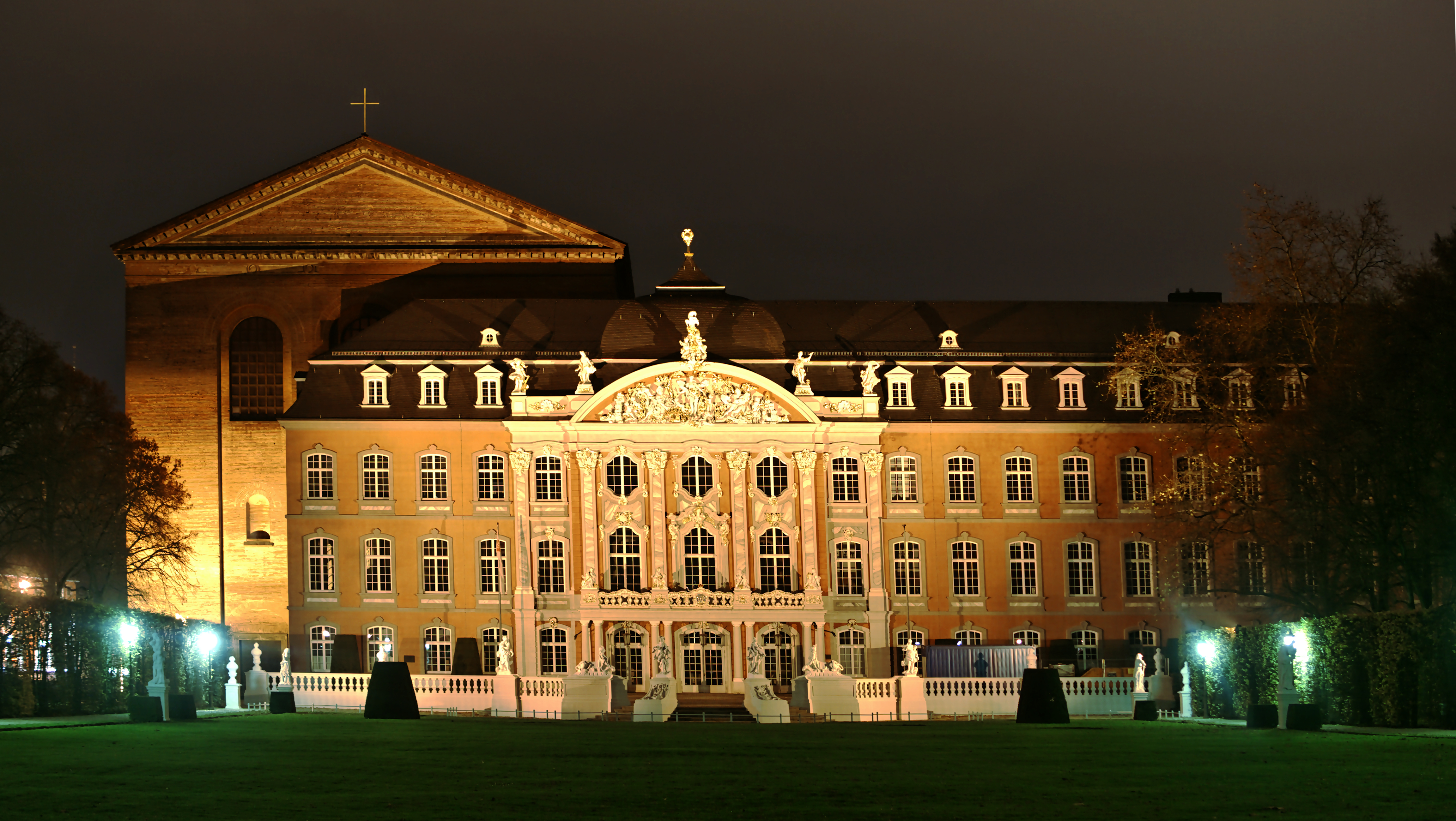 Konstantinbasilika und Kurfürstliches Palais vom Palastgarten.